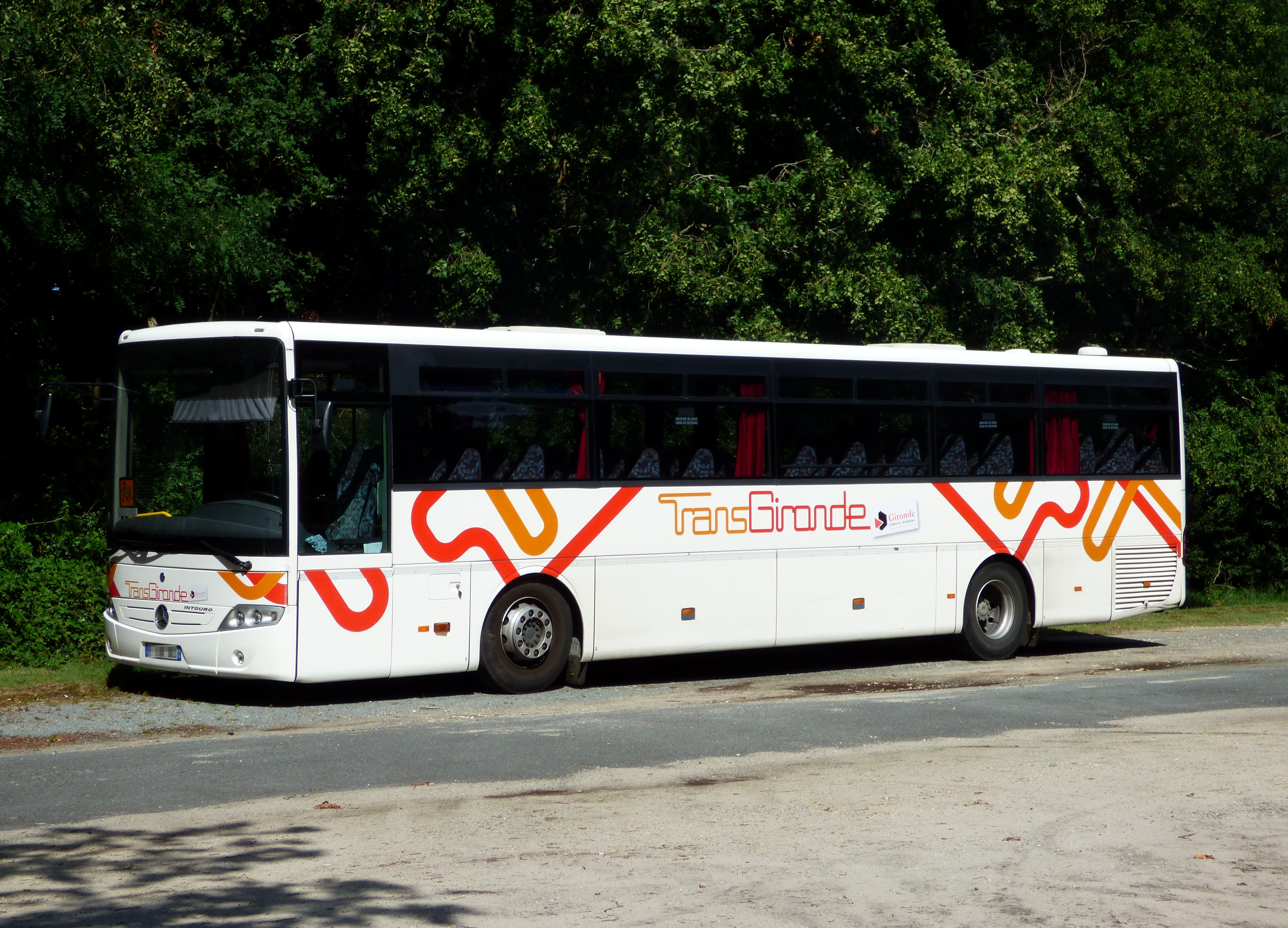 Un autocar TransGironde.